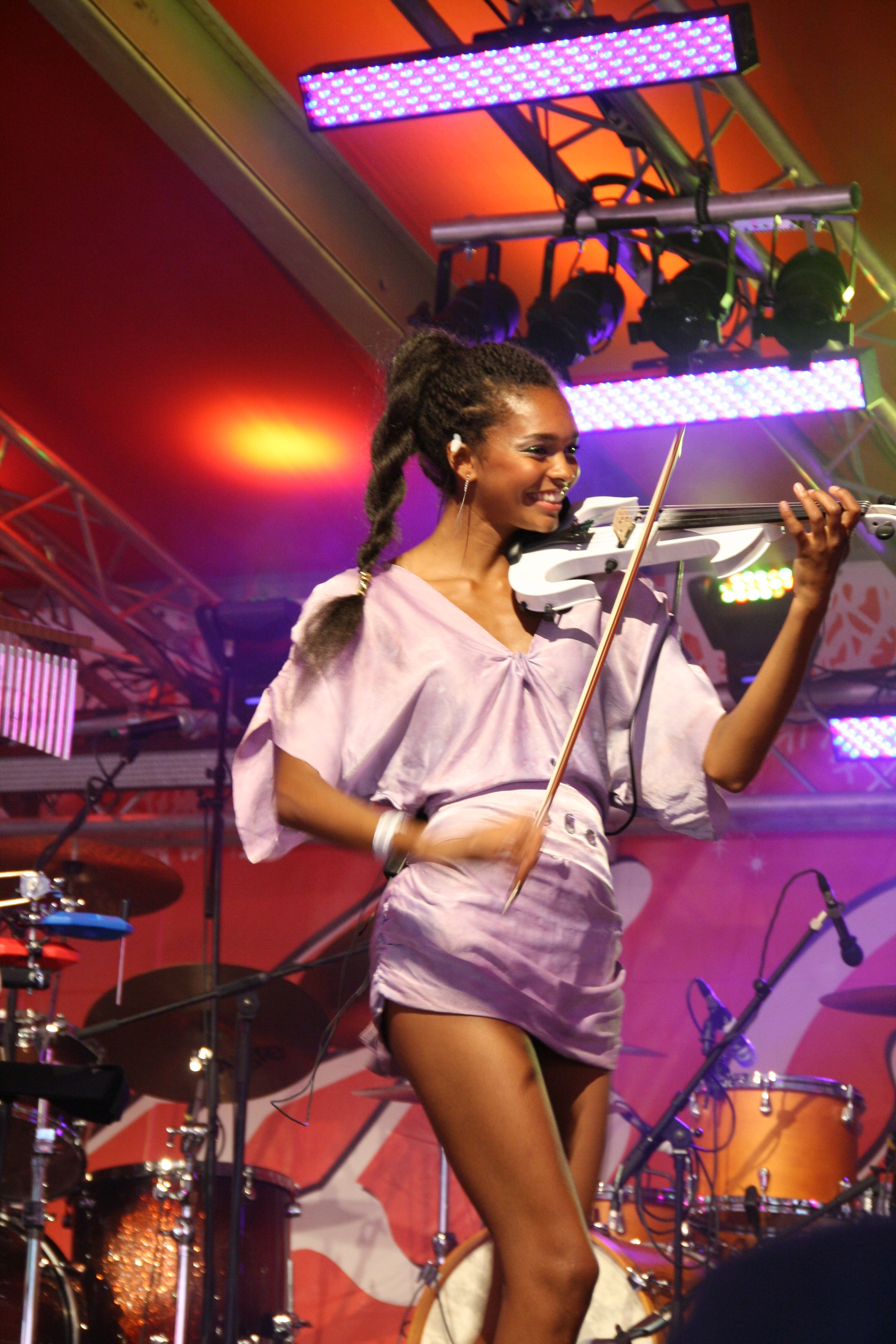 Daana Ots ansambli Violina koosseisus Tallinna Lauluväljakul